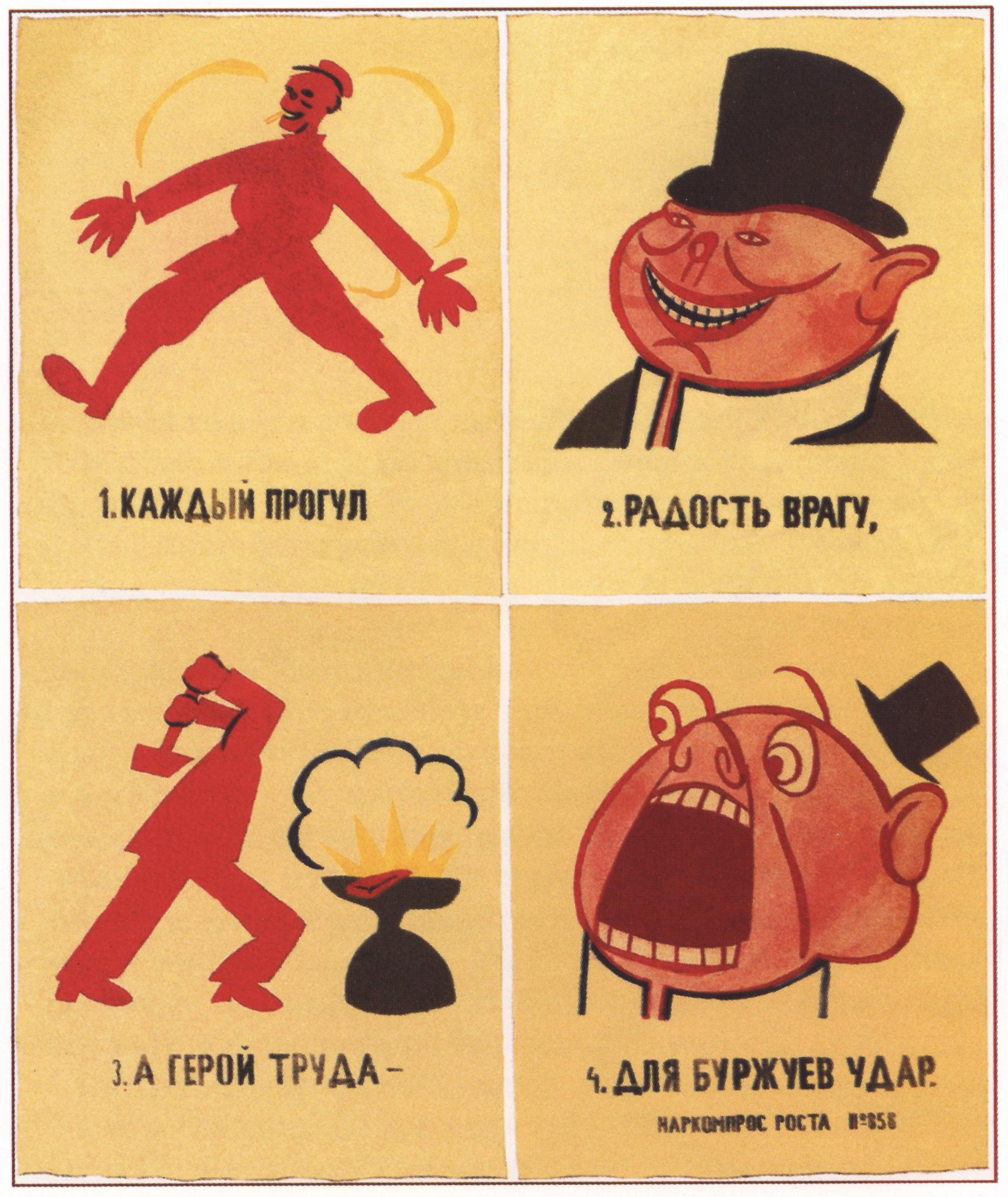 "Каждый прогул - радость врагу!..". Окно РОСТА №858. М.,1921. Трафарет; 130х 103.